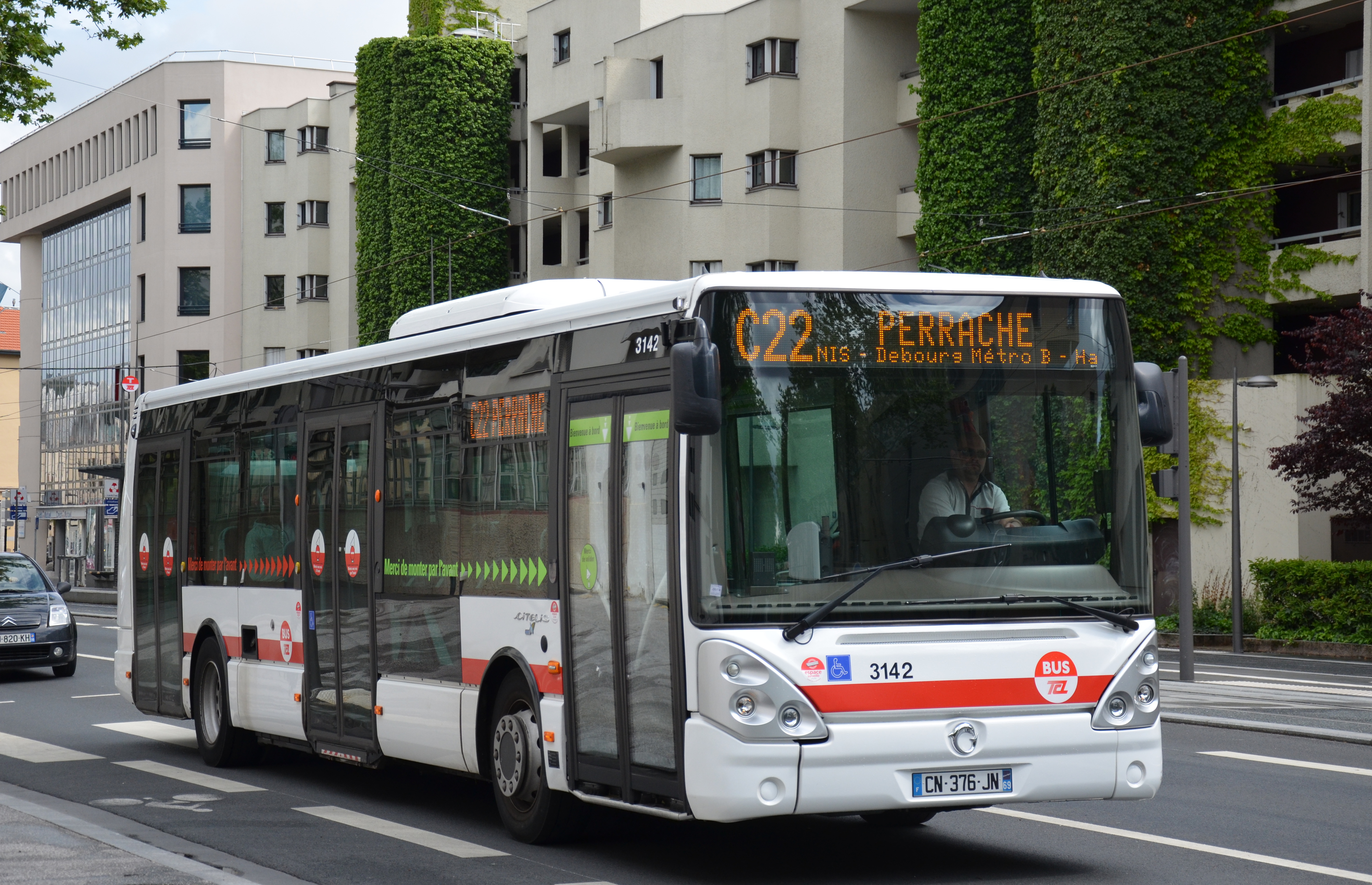 Irisbus Citelis 12 n°3142 sur la ligne C22, près de l'arrêt ENS Lyon, sur le réseau TCL.